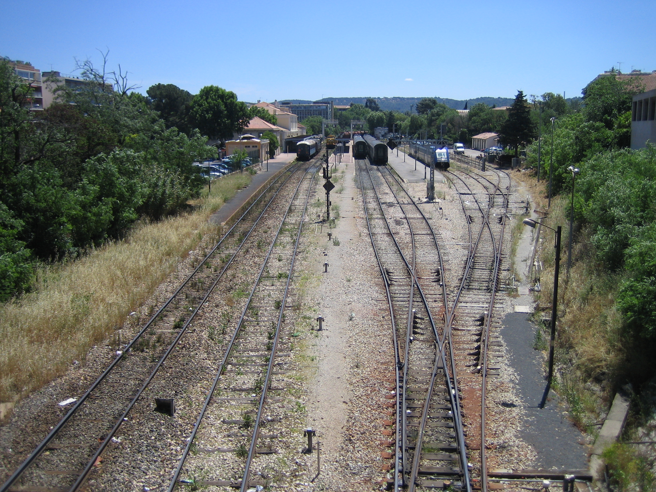 Voie ferrée à Aix-en-Provence (Bouches-du-Rhône). Train, SNCF, chemin de fer